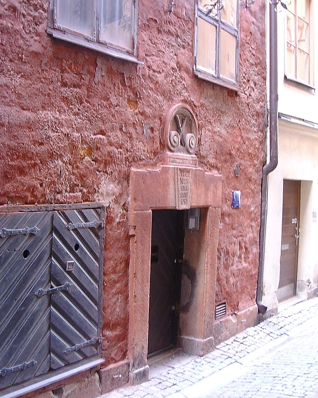 Door of 'Vindragarlagets härbärge' at 6, Stora Hoparegränd, Gamla stan, Stockholm.